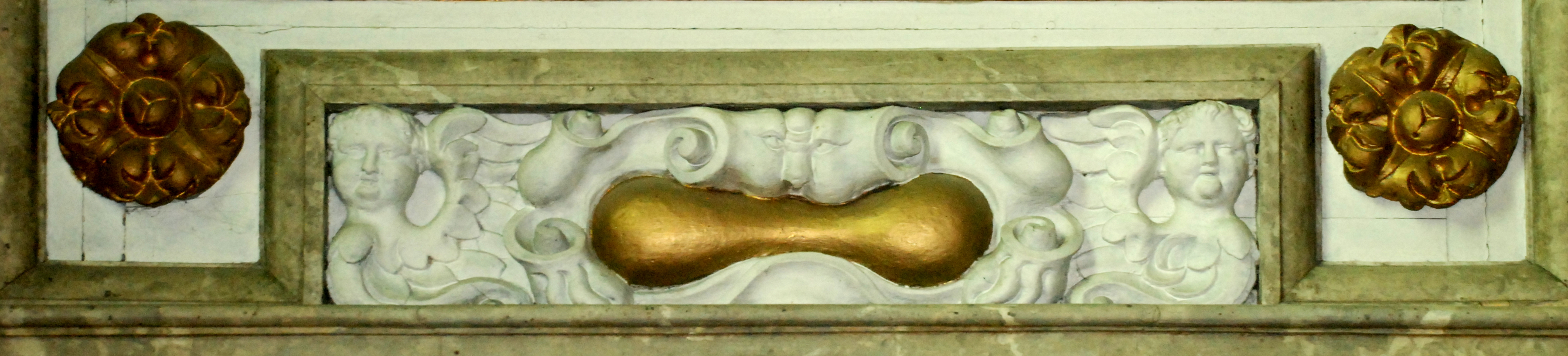 Belgique - Brabant wallon - Église de Court-Saint-Étienne